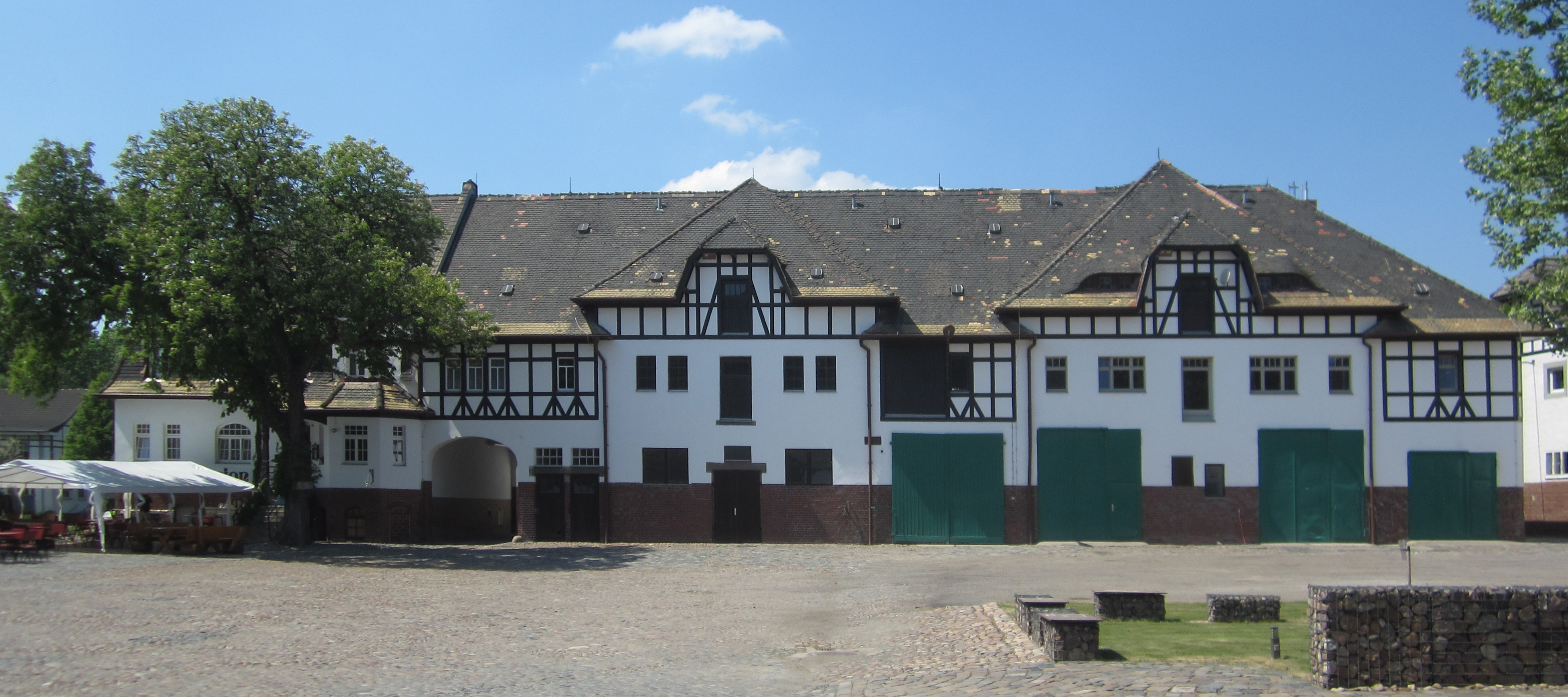 Schloß Plaußig, Plaußiger Dorfstraße 12, Vorwerk im Hof